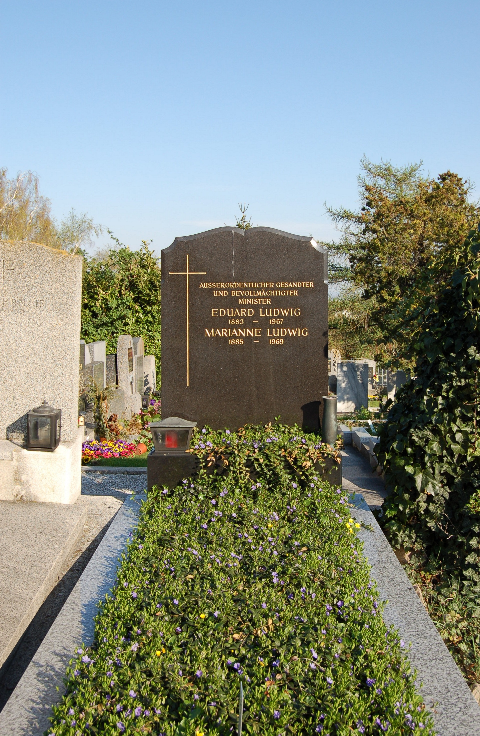 Sieveringer Friedhof, Grabstätte von Eduard Ludwig (Ehrengrab der Stadt Wien)